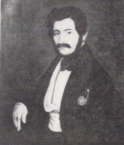 Ion. D. Negulici - Aga Iancu Manu